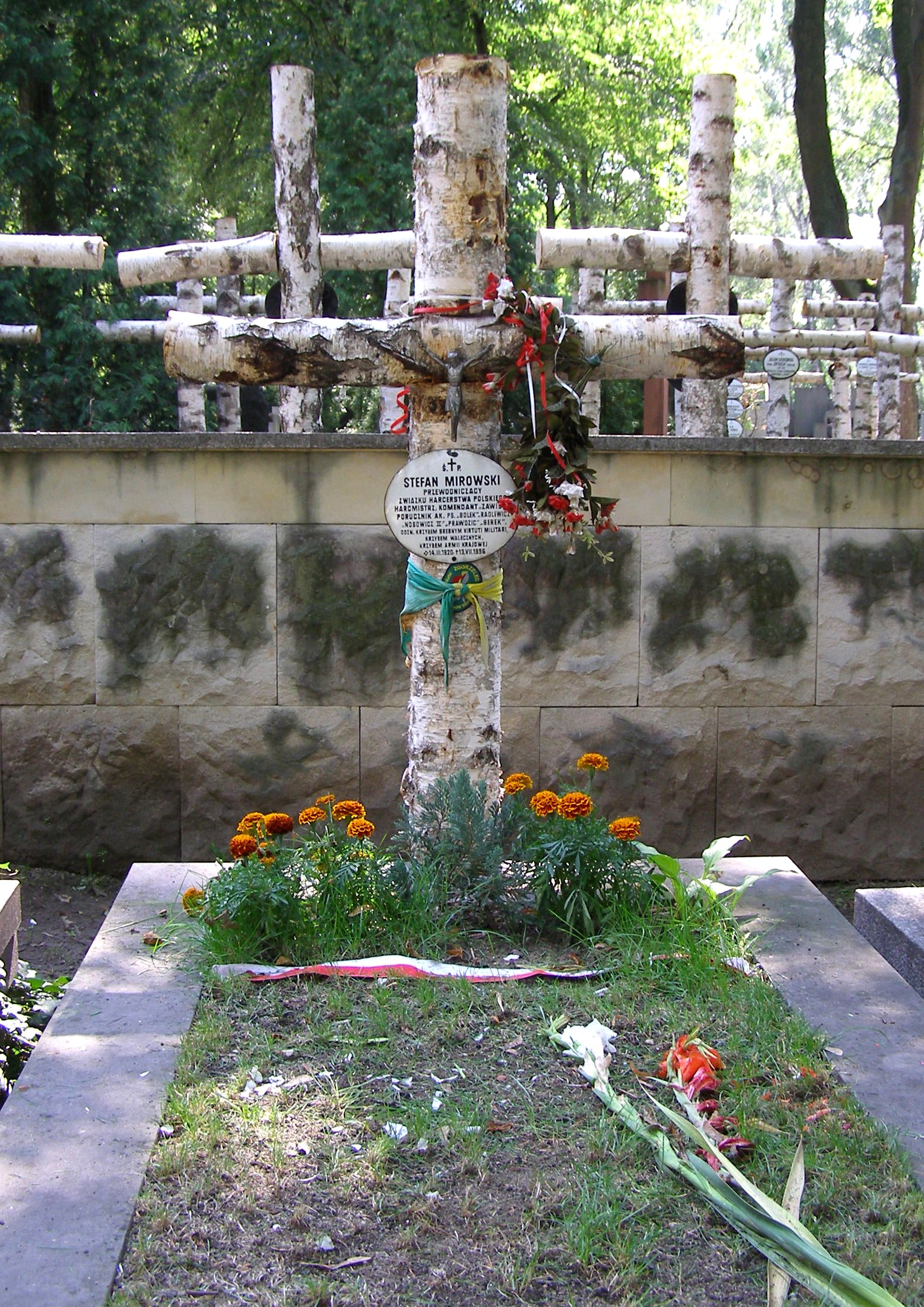 Grób Stefana Mirowskiego, Powązki wojskowe w Warszawie (fot Zu)